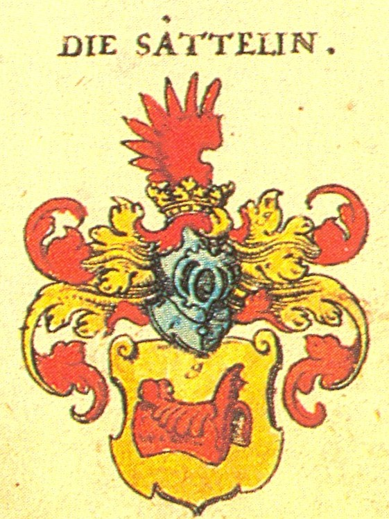 Ritterschaft und Adel in Schwaben Die Sättelin